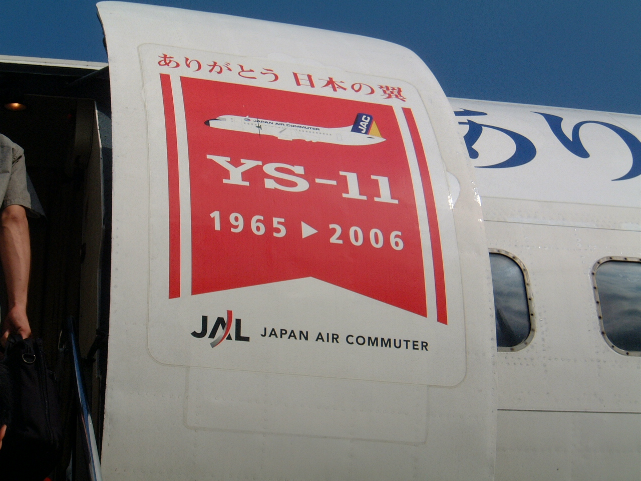 YS-11 特別塗装